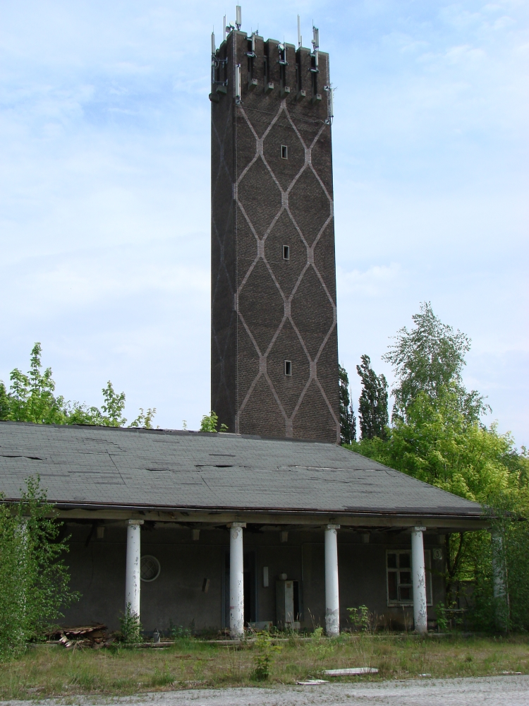 Ehemalige Kavallerieschule Krampnitz. Deutlich sichtbarer Turm neben dem Eingangstor. Ort: Potsdam-Krampnitz, Land Brandenburg, Deutschland